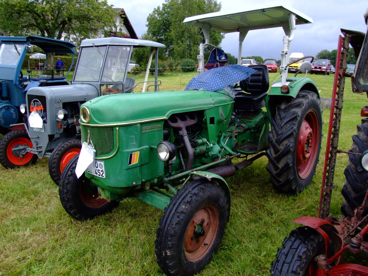 Deutz D5005, 45 PS, Baujahr 1967, 3,4-Liter-Maschine